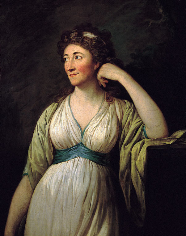 Bildnis der Dichterin Elisa von der Recke